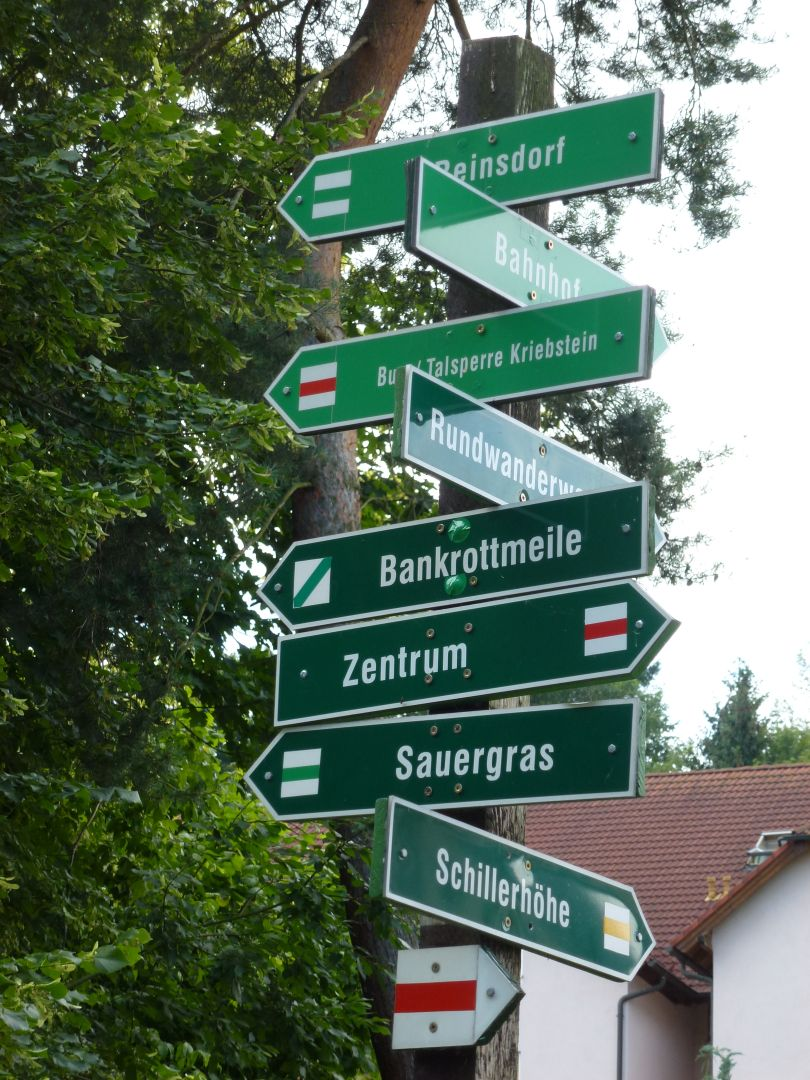 Schild in Waldheim